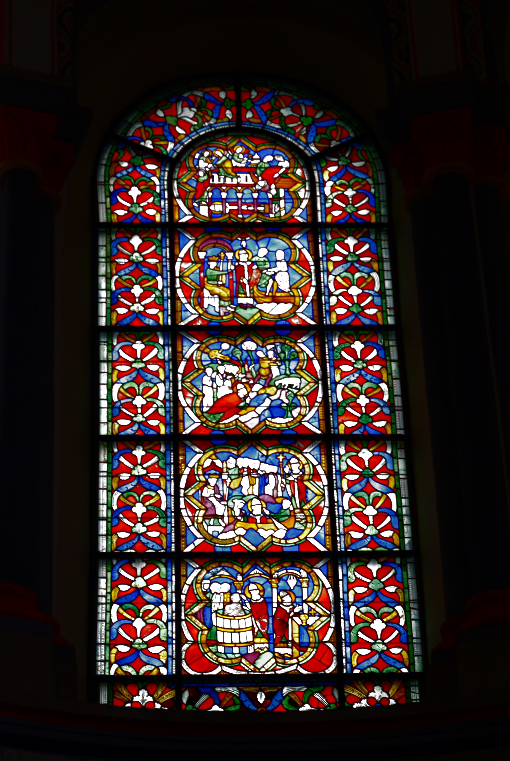 Bleiglasfenster (Clemensfenster) in der Chorapsis der katholischen Pfarrkirche St. Kunibert in Köln, Darstellung: Szenen aus dem Leben des Papstes Clemens I. (siehe Werner Schäfke: Kölns romanische Kirchen: Architektur, Kunst, Geschichte, Emons, Köln 2004, S. 115ff., ISBN 3897053217